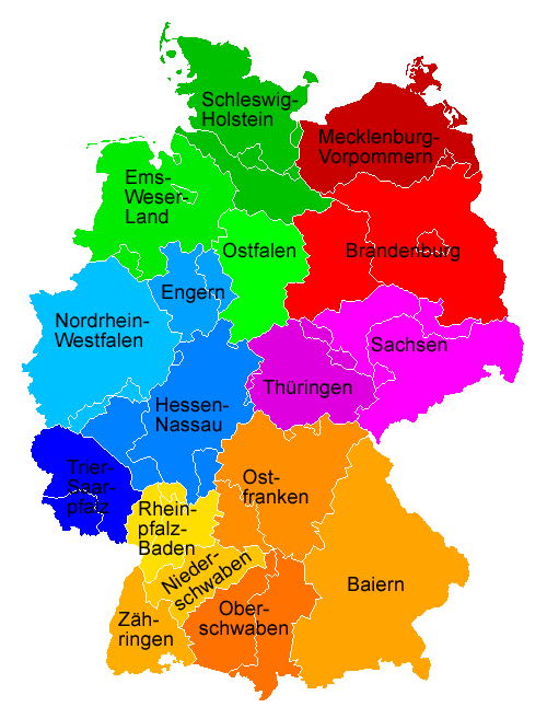 Vorschlag zur Neugliederung der Bundesrepublik Deutschland – 17-Länder-Lösung